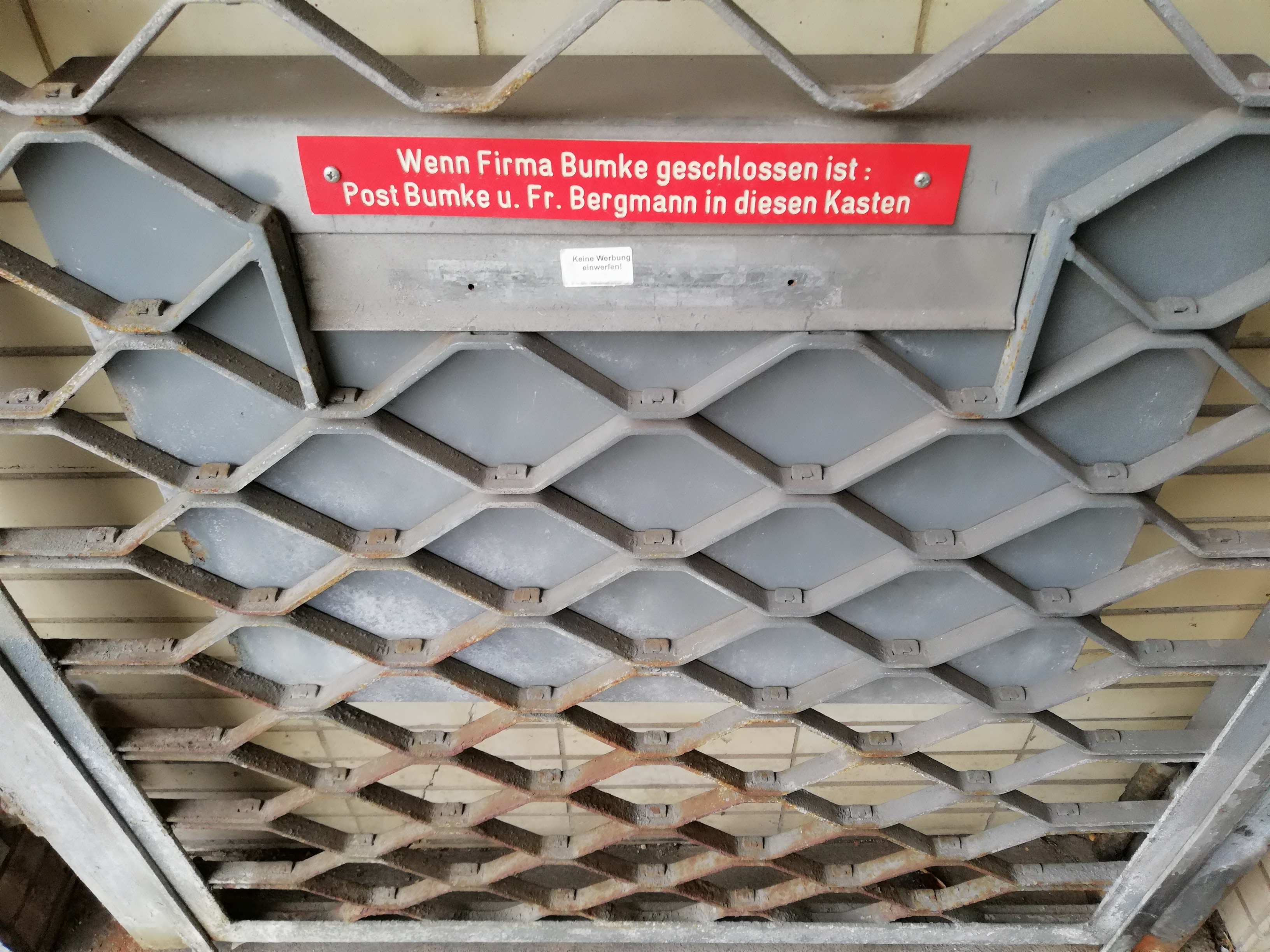 Gittertür mit Briefkasten am Gebäude Engelbosteler Damm 5 und Hinweisschild für die Briefträger „Wenn Firma Bumke geschlossen ist: Post Bumke und Fr. Bergmann in diesen Kasten“